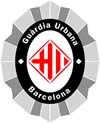 Escudo Guàrdia Urbana Barcelona